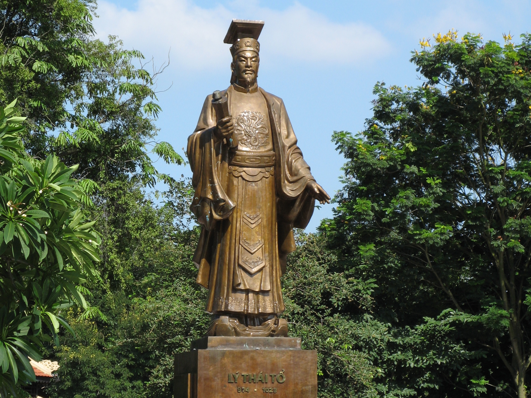 Statue of Lý Thái Tổ in Hanoi, Vietnam.